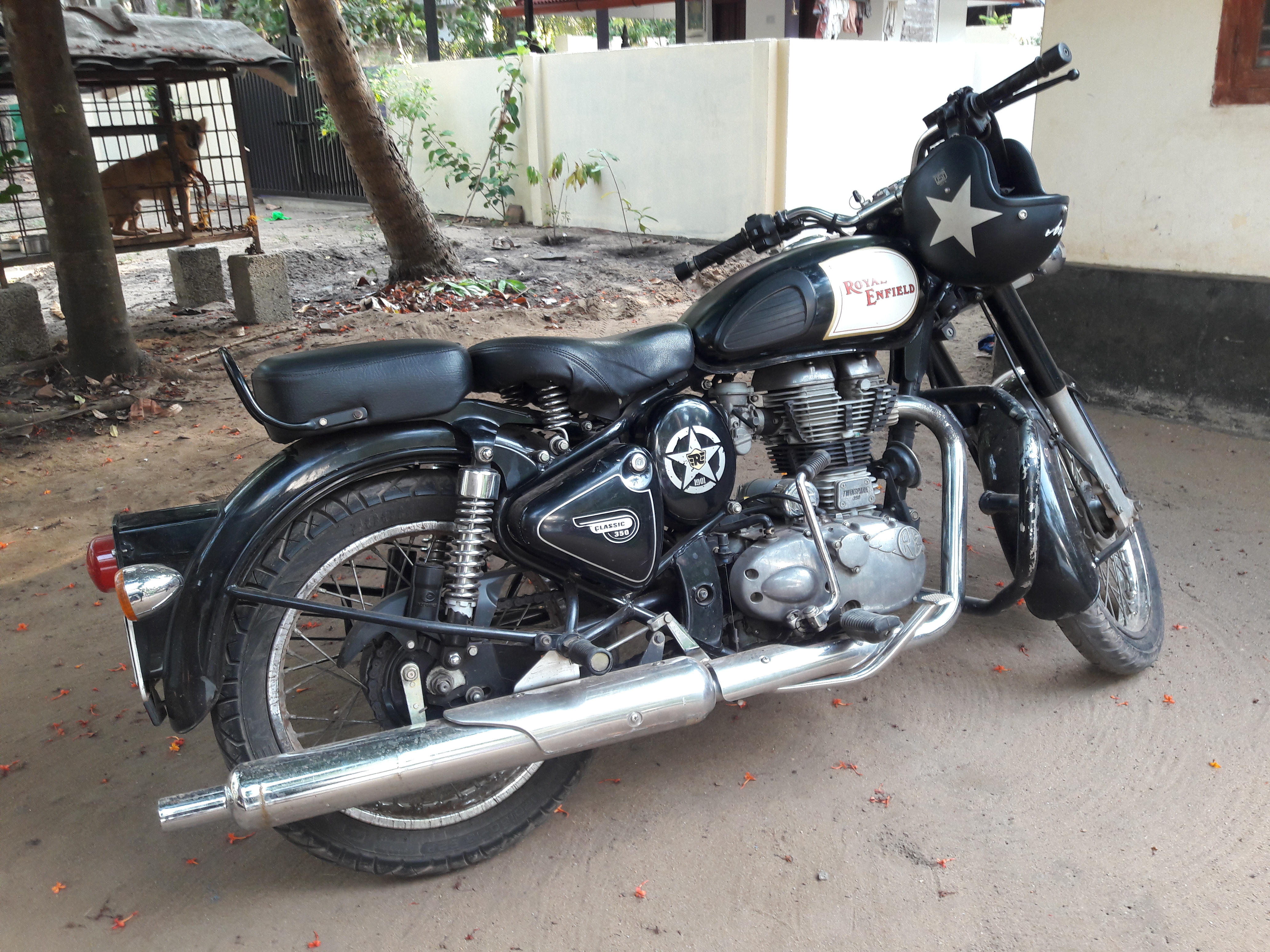 റോയൽ എൻഫീൾഡ് ബുള്ളറ്റ്